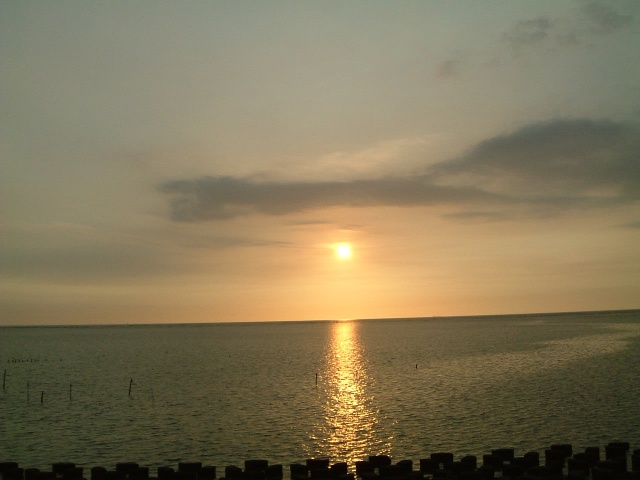 王功夕陽餘暉--本人拍攝於王功漁港 Richard1125 02:14 2005年8月3日 (UTC)